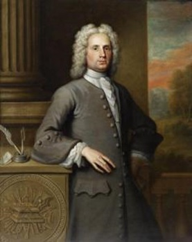 Porträt Theodore Jacobsen von William Verelst.